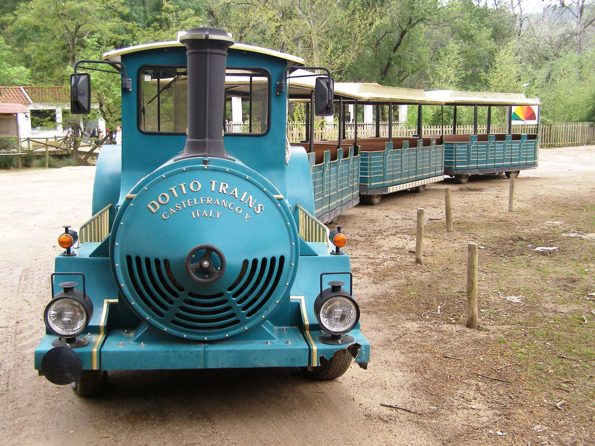 "Train" for visitors, Tapada Nacional de Mafra, Portugal.